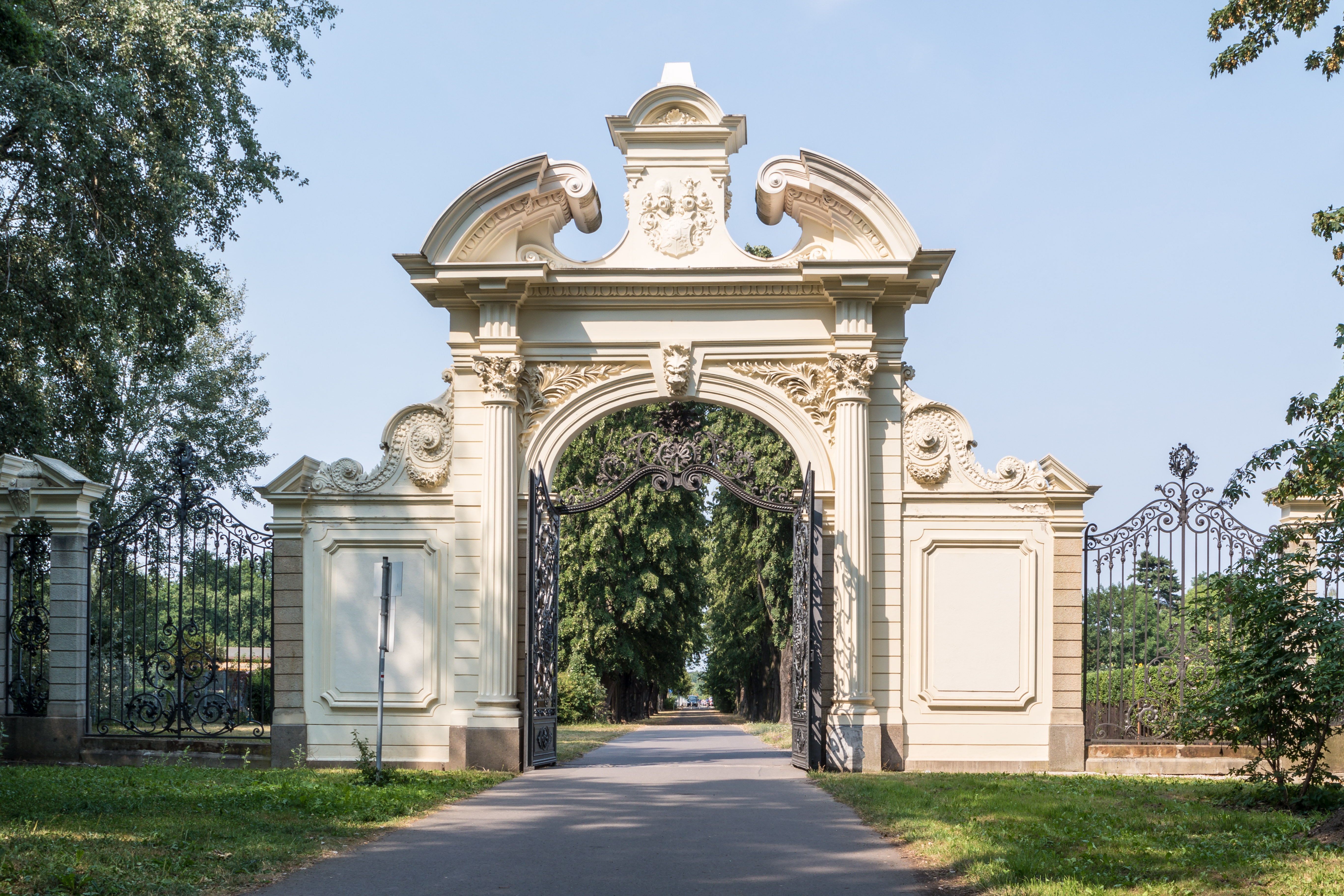 Adlertor - Eingangstor zum Keesschen Park in Markkleeberg (Gut Gautzsch)